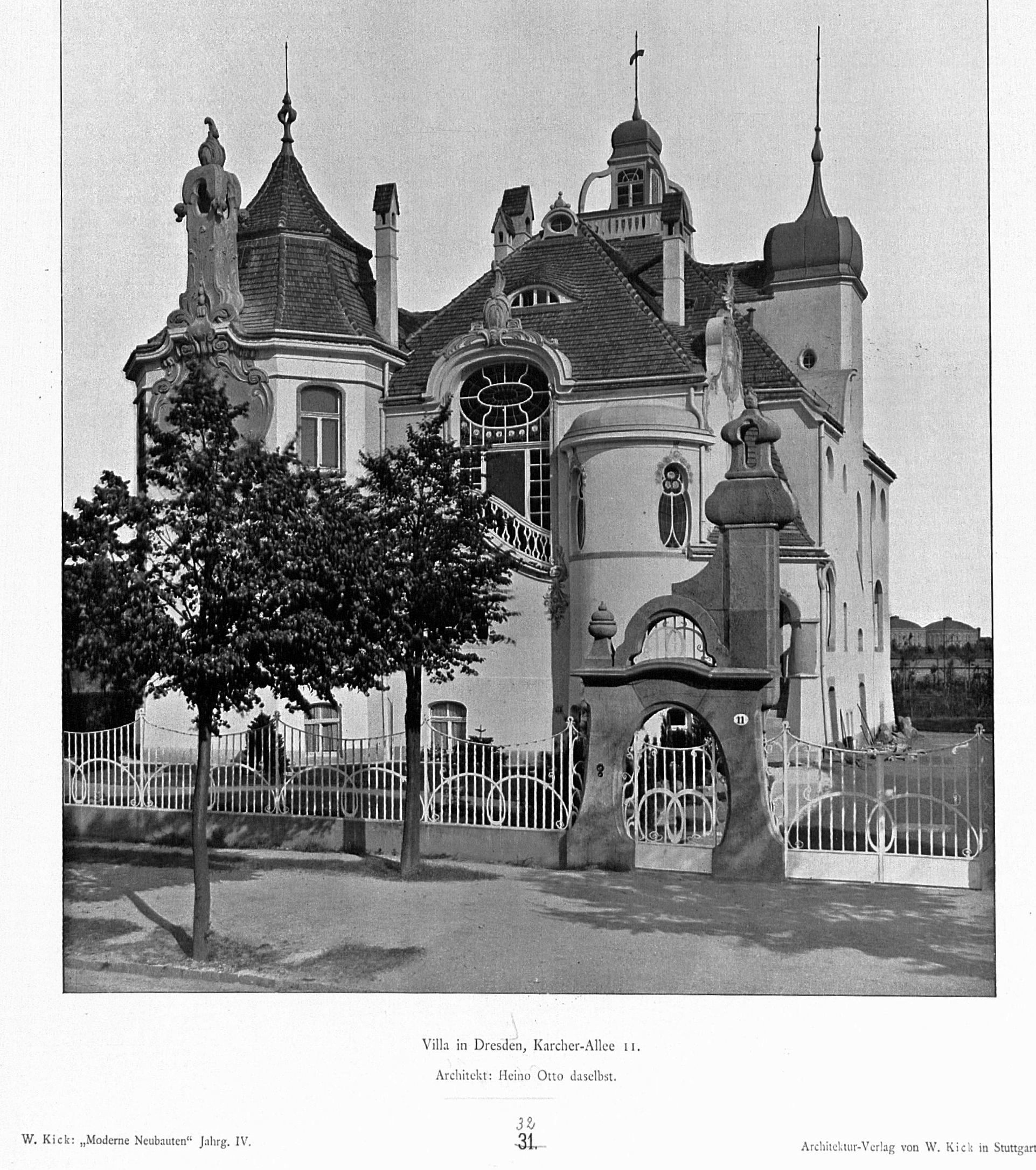 Villa Roesch in Dresden-Gruna, Karcherallee 11, am Ostrand des Großen Gartens; erbaut vor 1903 nach Entwurf des Dresdner Architekten Heino Otto; 1945 kriegszerstört